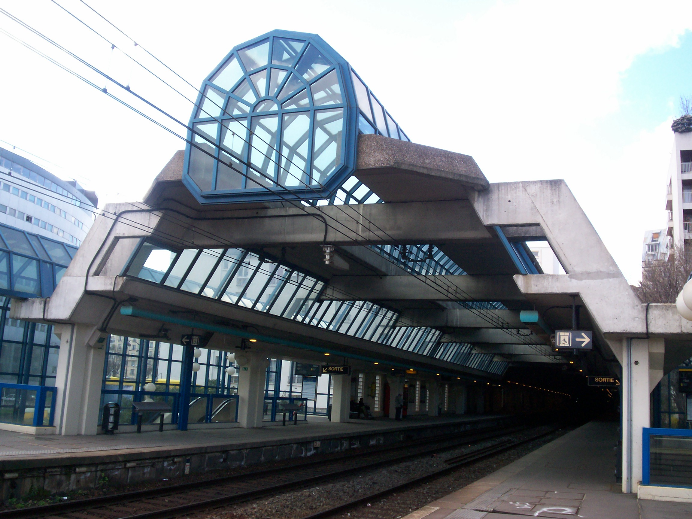 Gare de l'Avenue du Président Kennedy